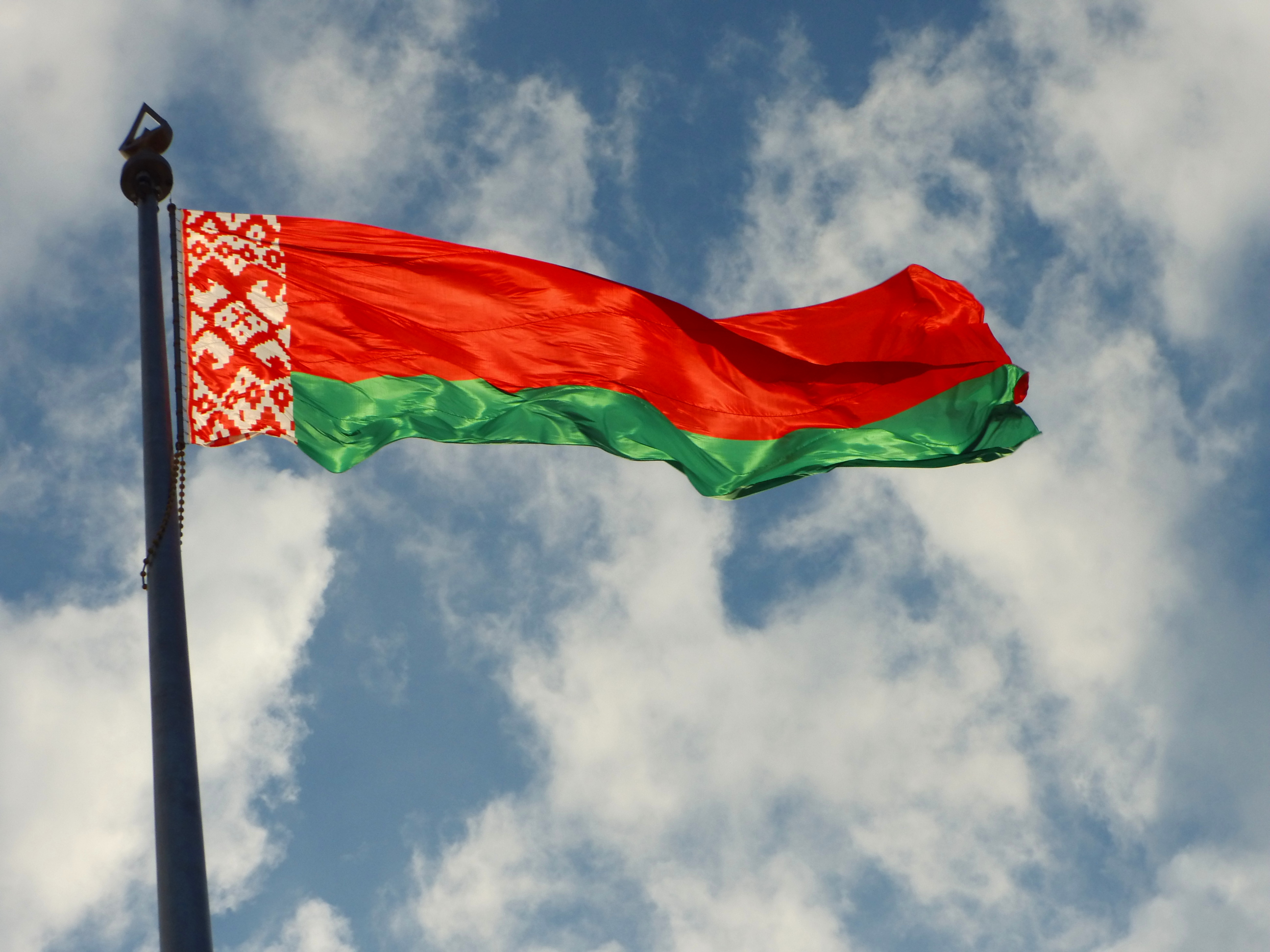 Флаг Белоруссии развевается на площади Государственного флага